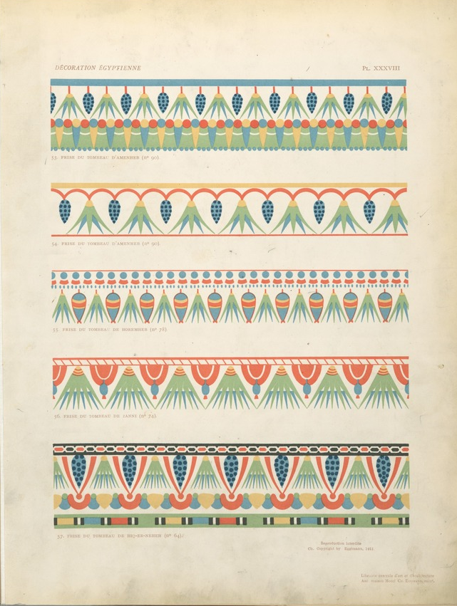 Planche de frises décoratives issues des tombeaux du Nouvel Empire, dessinée par Gustave Jéquier. Publiée dans "Décoration égyptienne, plafonds et frises végétales du Nouvel Empire thébain (1400-1000 av. J.-C.)", ouvrage édité à Paris par Eggimann en 1911.